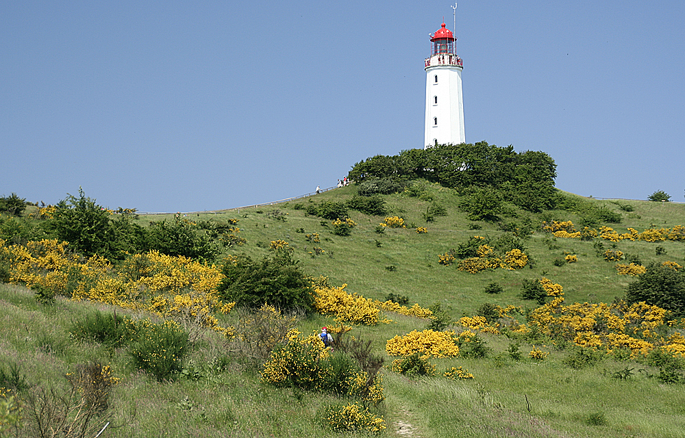 Hiddensee / Dornbusch: Blick auf den Leuchtturm